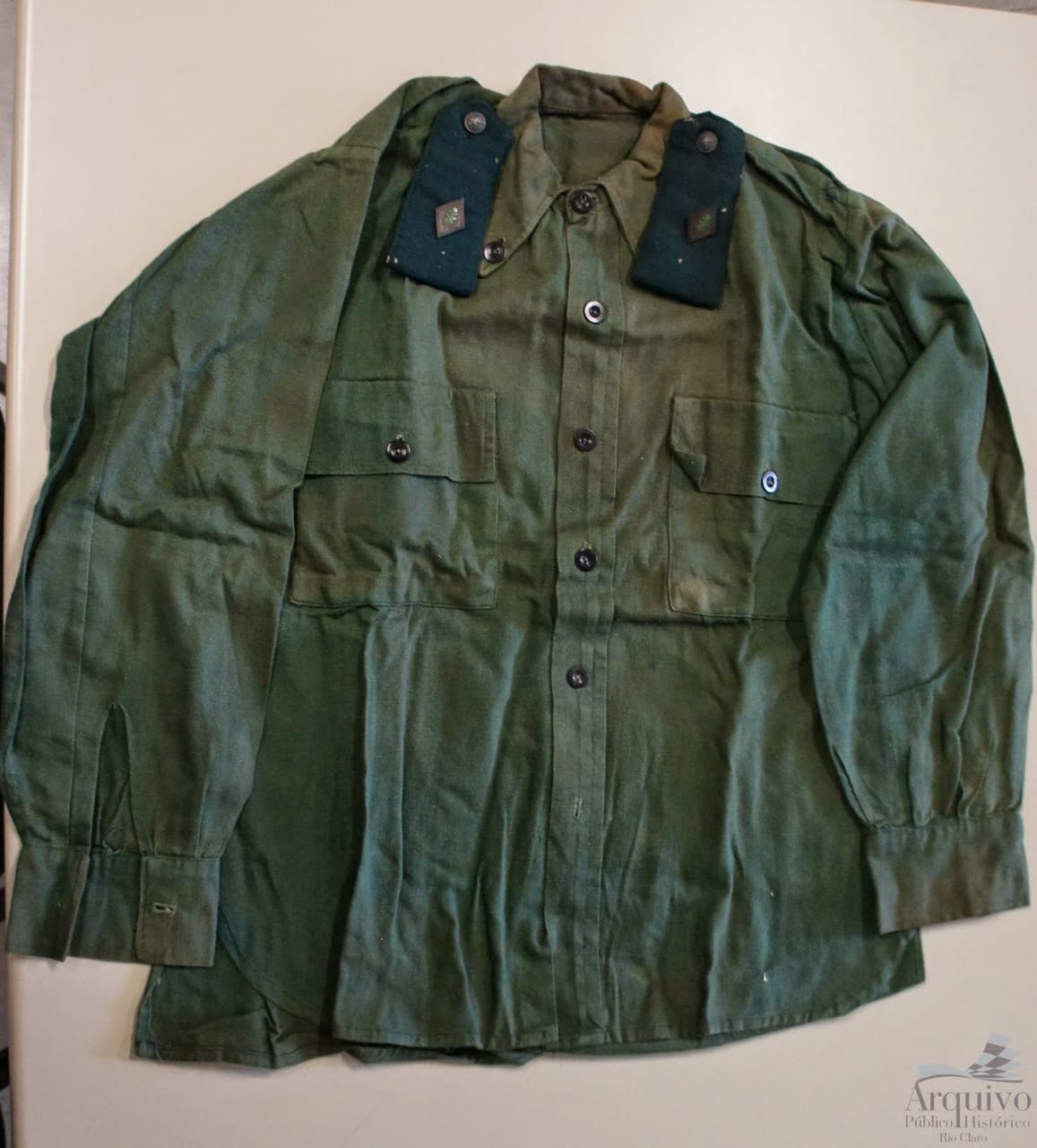 Camisa verde original da ação integralista brasileira do Acervo Plínio Salgado